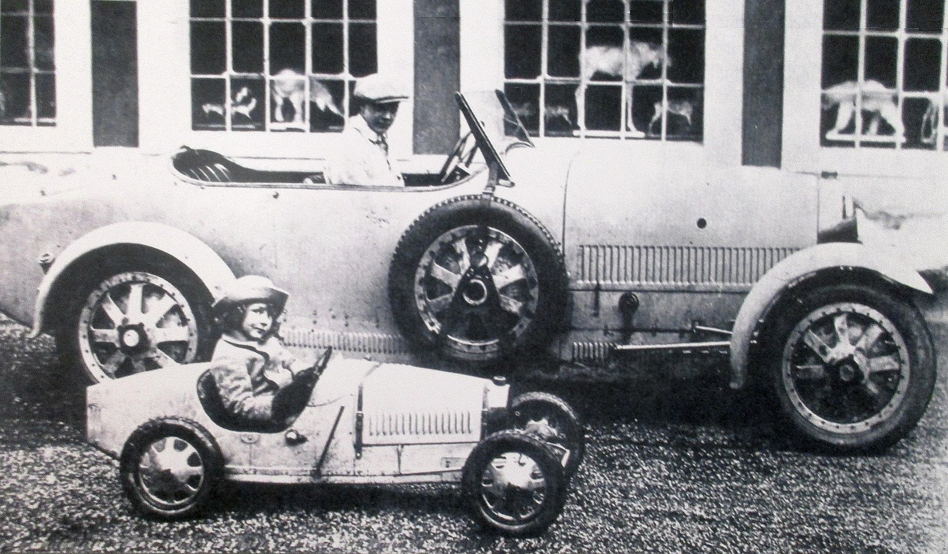 Roland Bugatti enfant, à bord de sa Bugatti Type 52 enfant électrique, devant la Bugatti Type 43 de son frère Jean Bugatti, dans cours de l'usine Bugatti de Molsheim, devant l'atelier d'artiste et les œuvres animalières de Rembrandt Bugatti. Photo du musée Bugatti de Molsheim